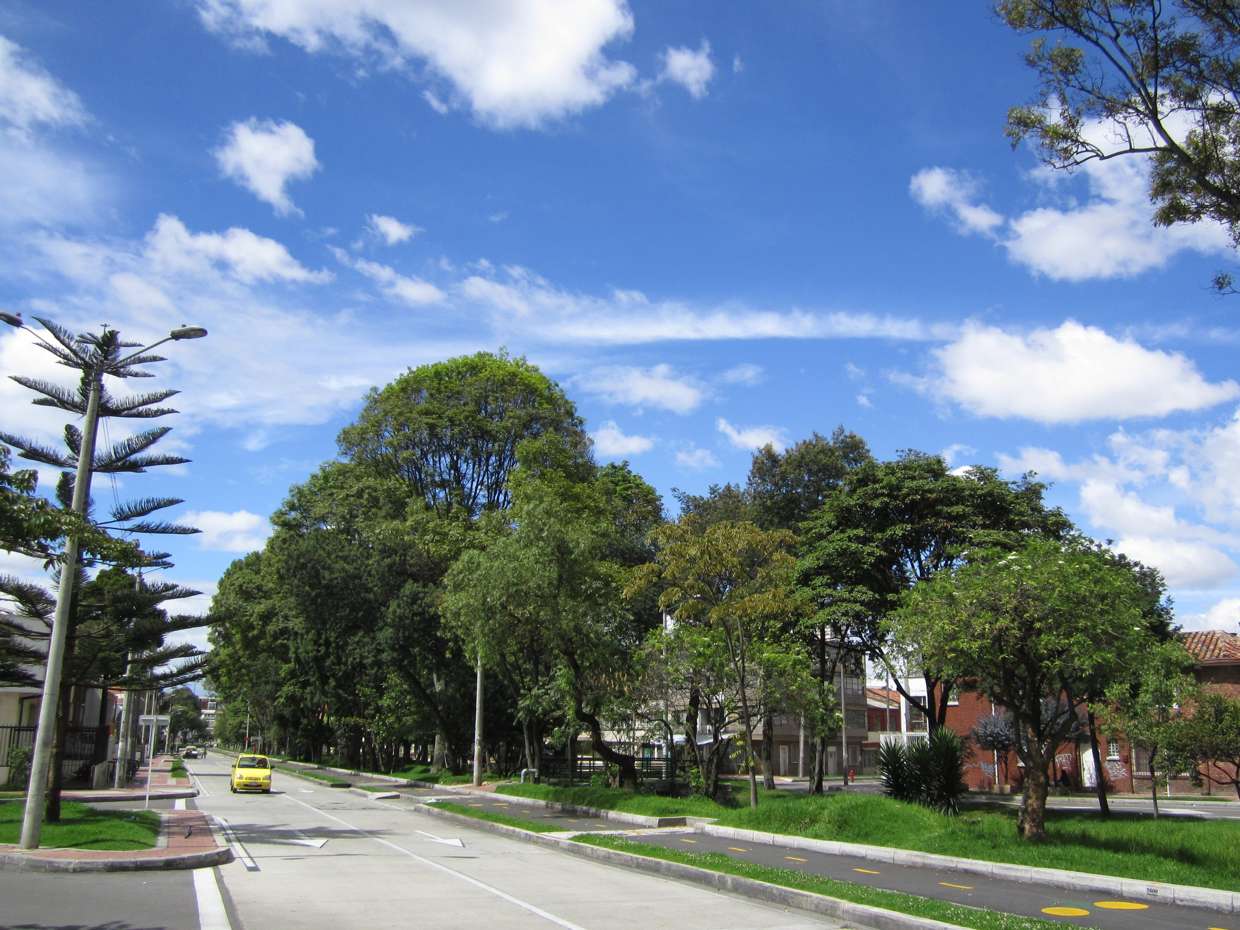 Ronda del río Arzobispo en el sector de Teusaquillo. Carrera 20 con calle 41, extremo norte del barrio La Soledad.